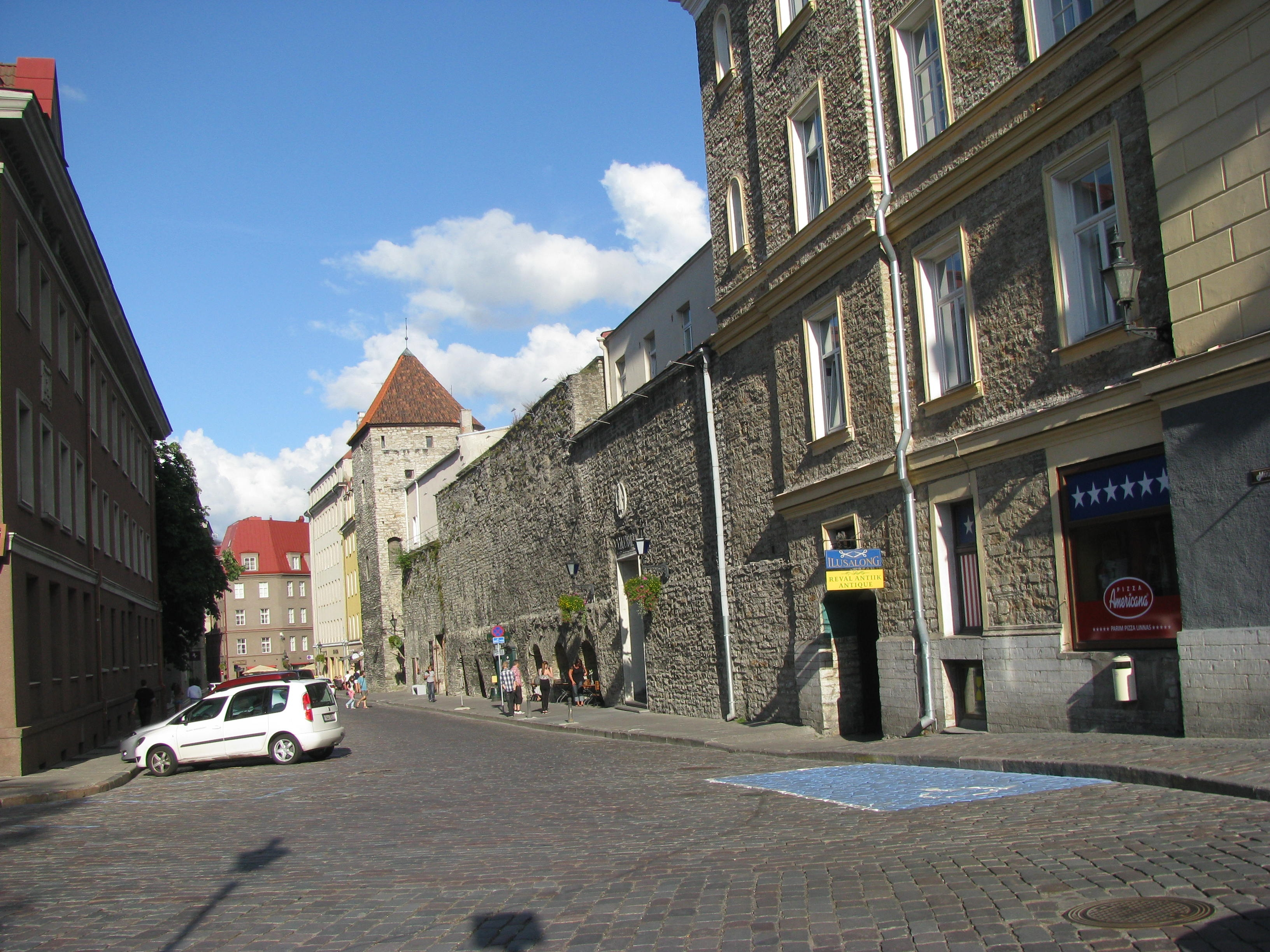 Assauwe torn Myyrivahe tänaval, vaade Harju tänava nurgalt.